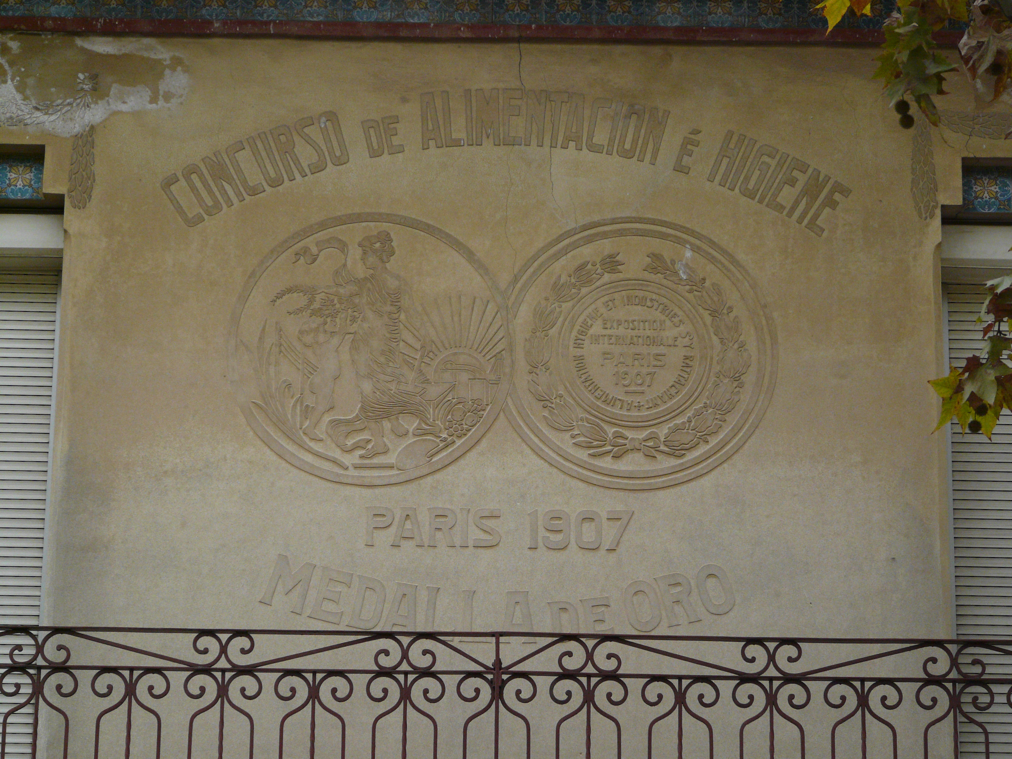 Casa Cahué (Sant Feliu de Llobregat) Object location41° 22′ 57.09″ N, 2° 02′ 49.74″ E